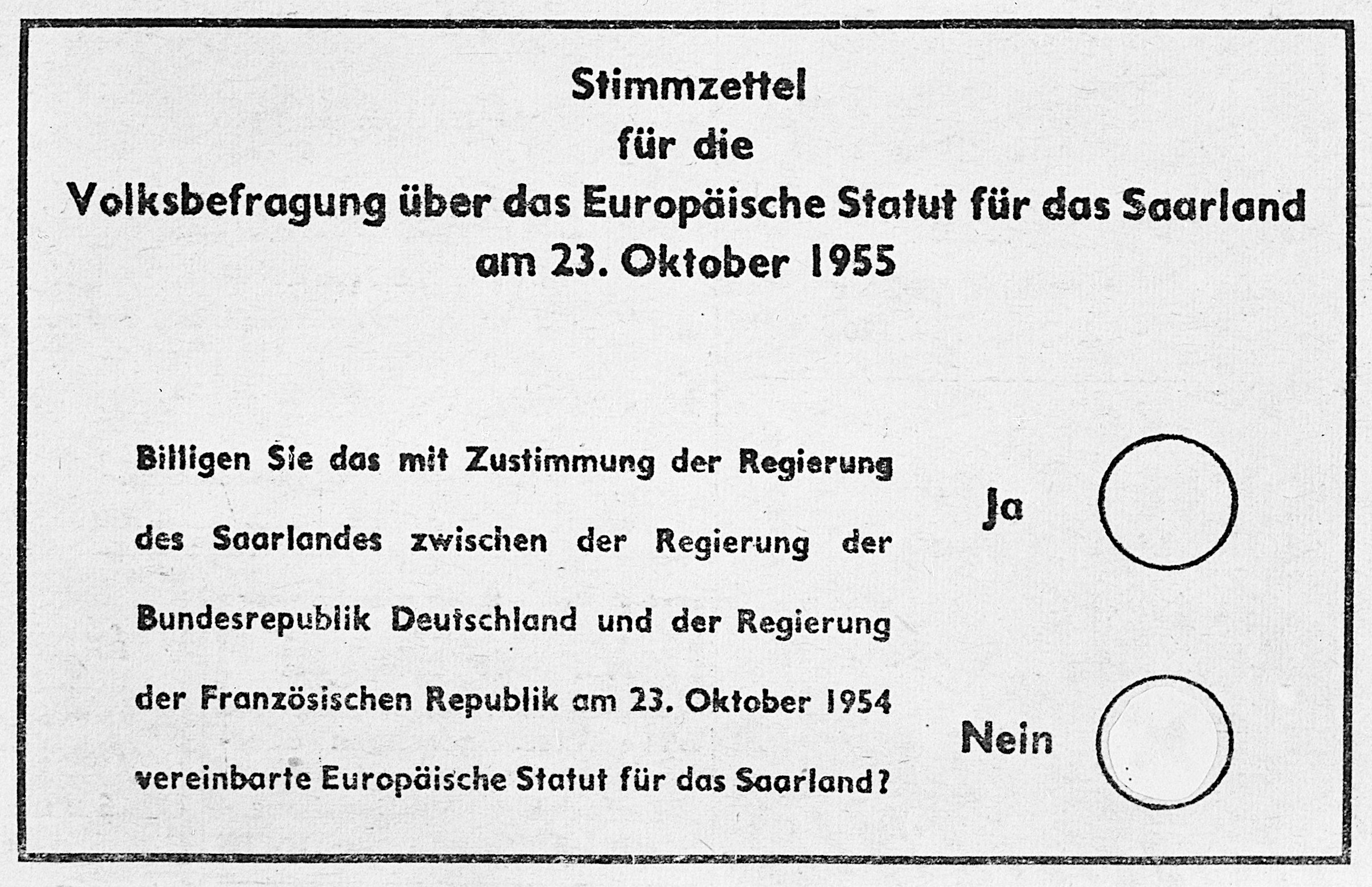 Collectie / Archief : Fotocollectie Anefo Reportage / Serie : [ onbekend ] Beschrijving : Repro Dr. Meij (Kath.), Dr. Konrad , Dr. Schneider stembiljet Datum : 14 oktober 1955 Trefwoorden : Repros, stembiljetten Persoonsnaam : Dr. Konrad, Dr. Meij, Dr. Schneider Fotograaf : Pot, Harry / Anefo Auteursrechthebbende : Nationaal Archief Materiaalsoort : Glasnegatief Nummer archiefinventaris : bekijk toegang 2.24.01.09 Bestanddeelnummer : 907-3848